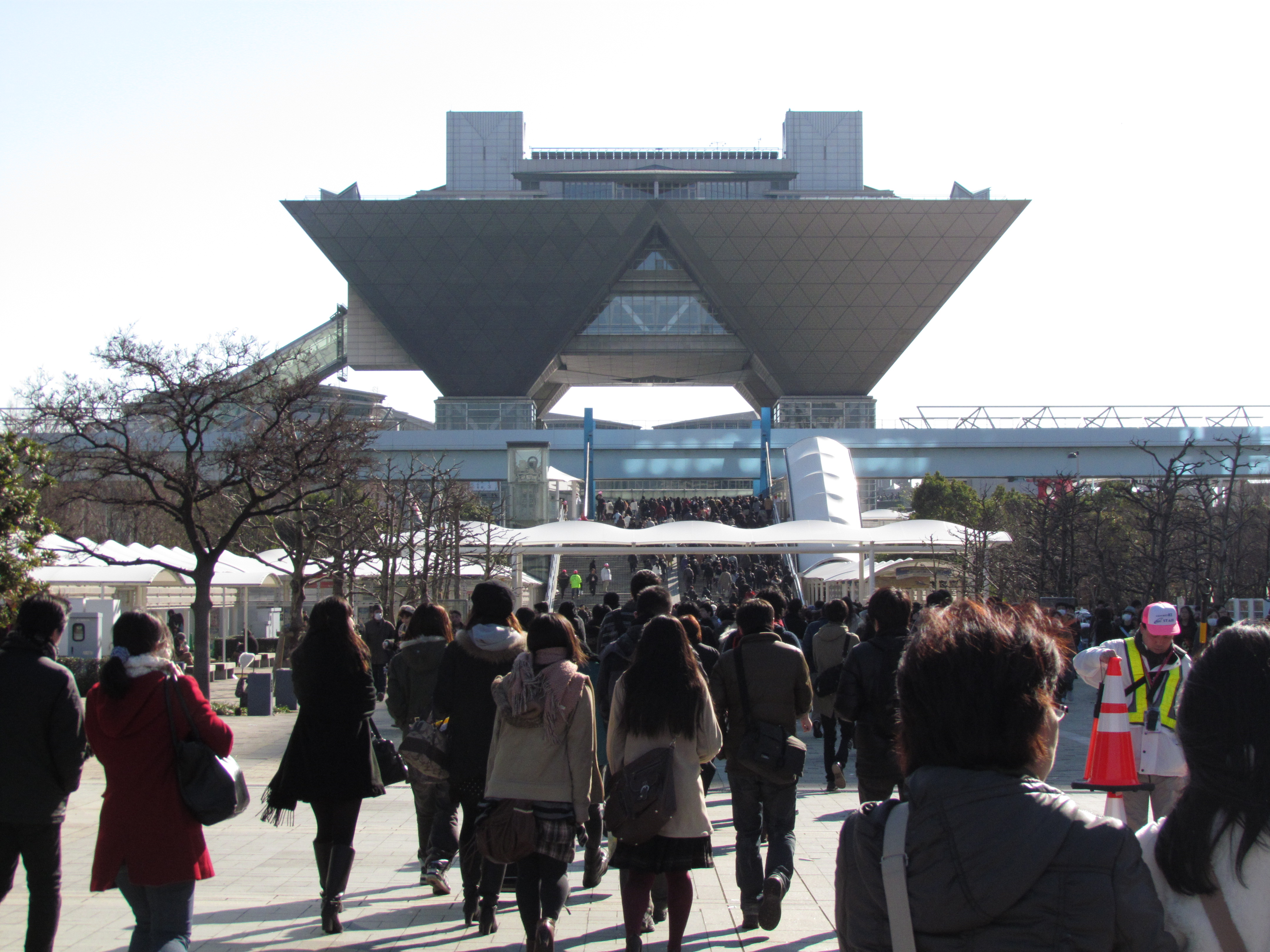 Vista del Tokyo Big Sight